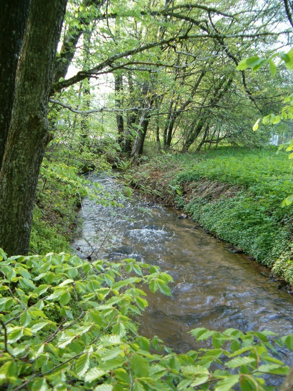 Das Hänner Wuhr bei Süßloch auf der Wasserscheide der Murgseitenbäche Altbach(Hottingen) und Schwarzbach. Die Wühre hat an dieser Stelle eine Stecke von ca. 3,1 km passiert und verläuft zwischen dem Sportplatz des TSV Hottingen und der Landesstraße 151. Aufnahme vom 06. Mai 2006.